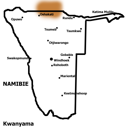 Verspreidingsgebied Kwanyama in Namibie.